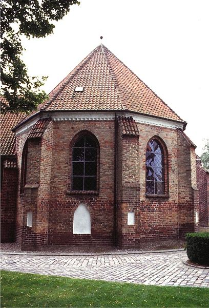 Vordingborg Vor Frue Kirke i Danmark. Koret set fra øst